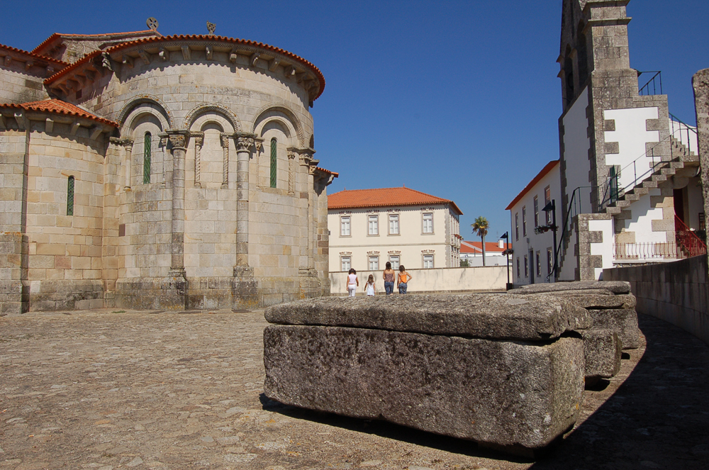 San Pedro de Rates: ábsides